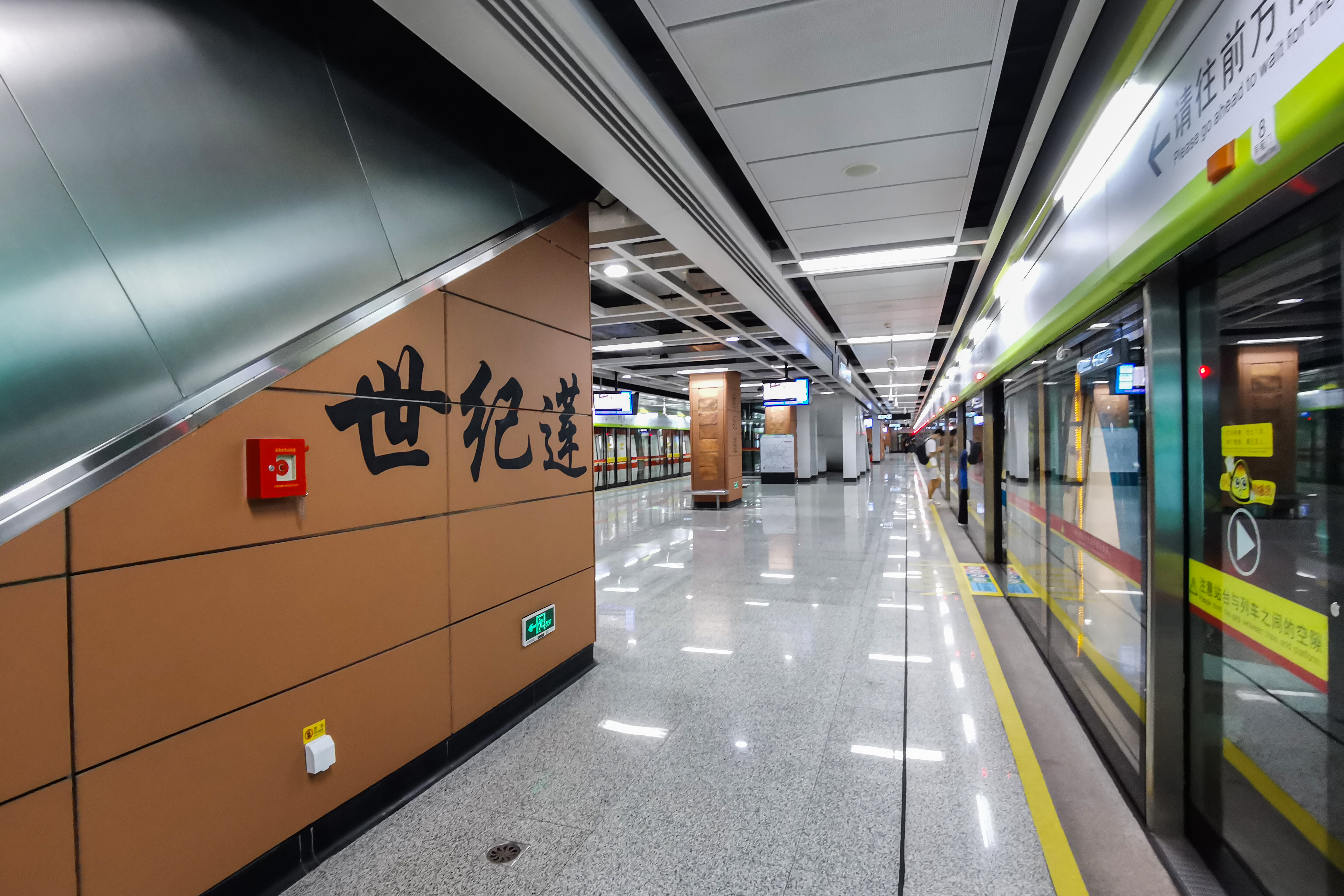 广佛地铁世纪莲站